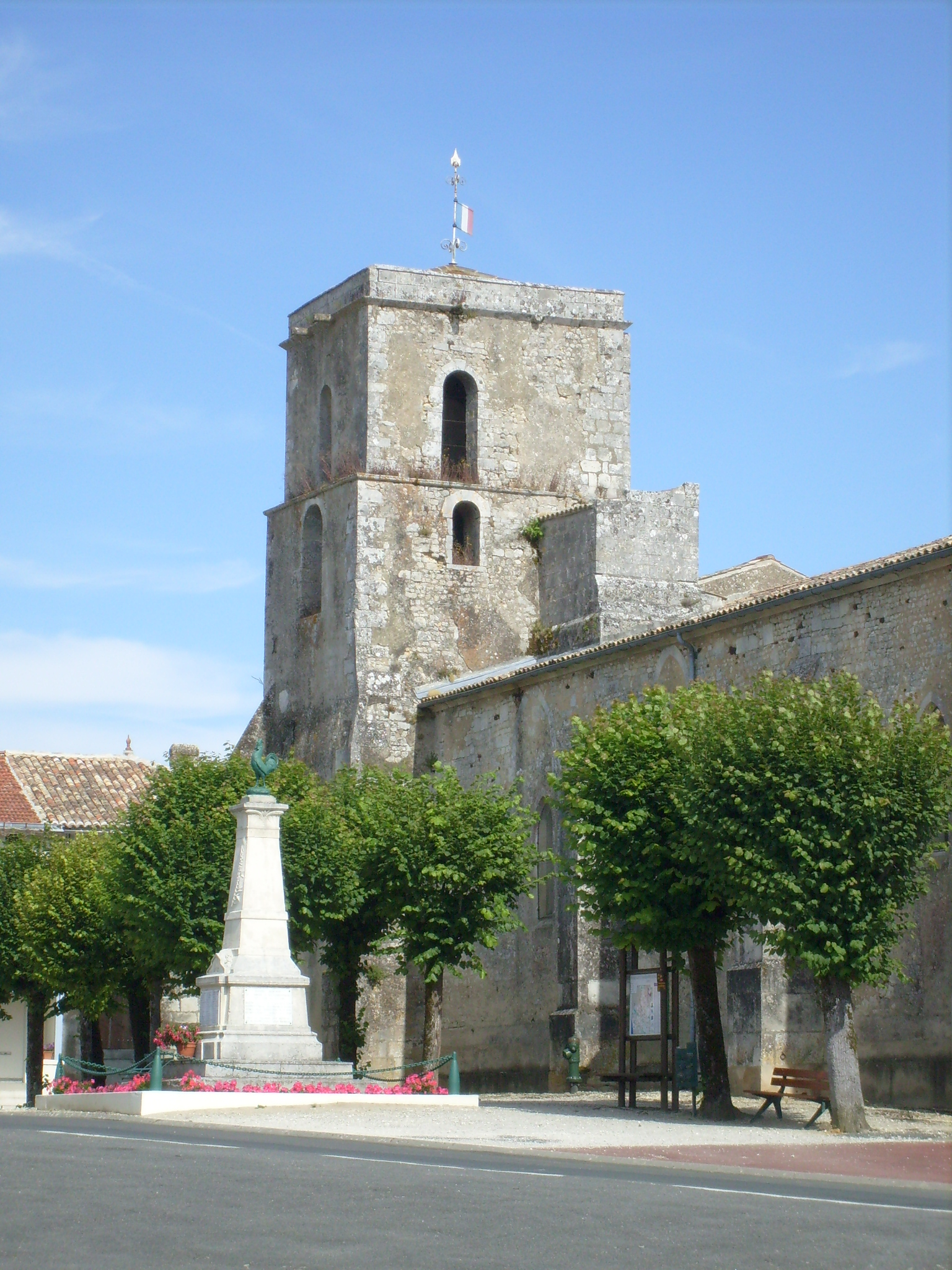 Clocher de l'église de Saint-Thomas-de-Cônac